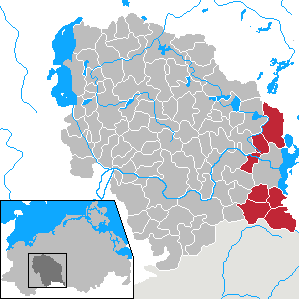 Amt Plau-Land in Mecklenburg-Vorpommern - District Parchim